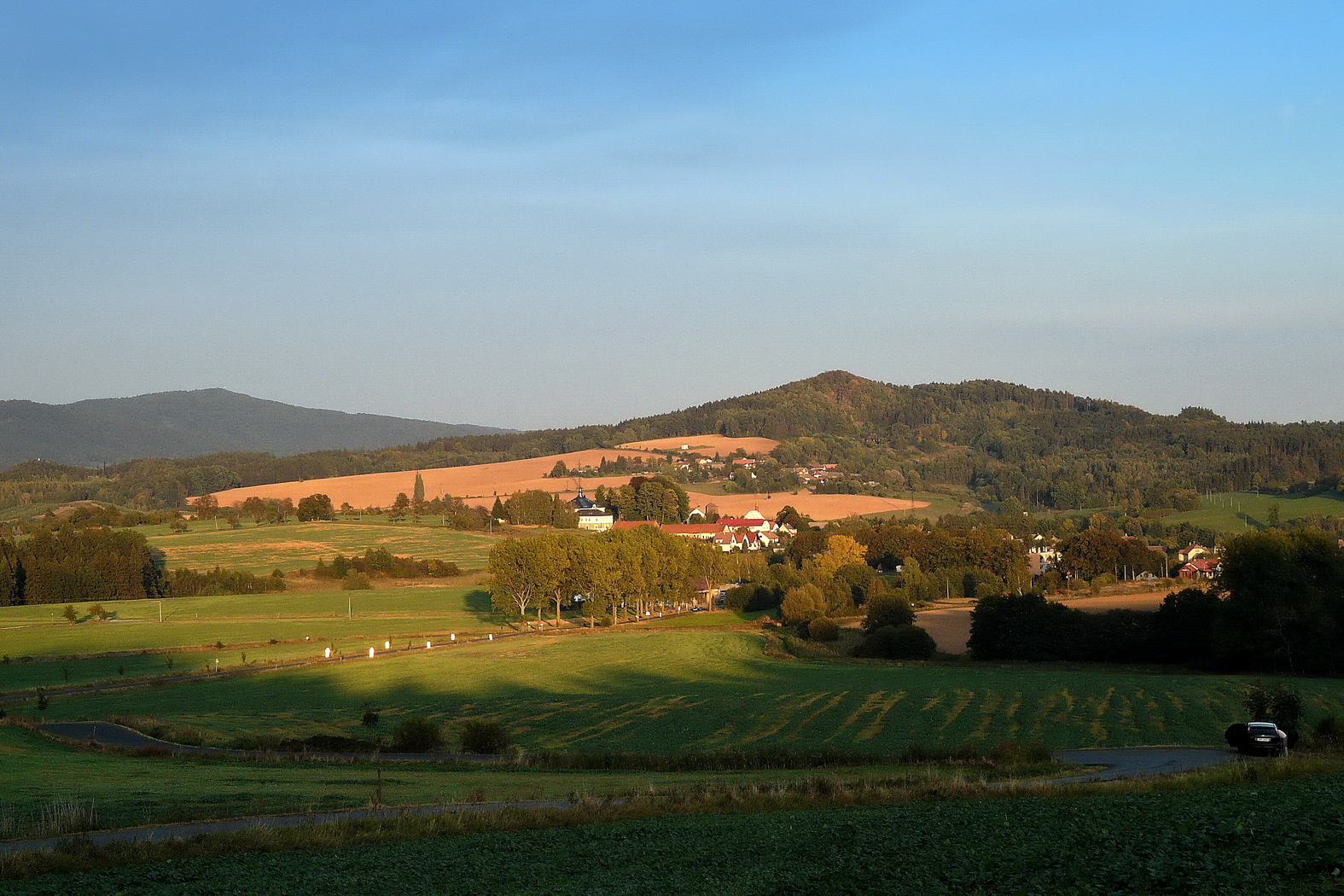 Střelečská hůra (vpravo) nad Mladějovem. Vlevo vrch Tábor